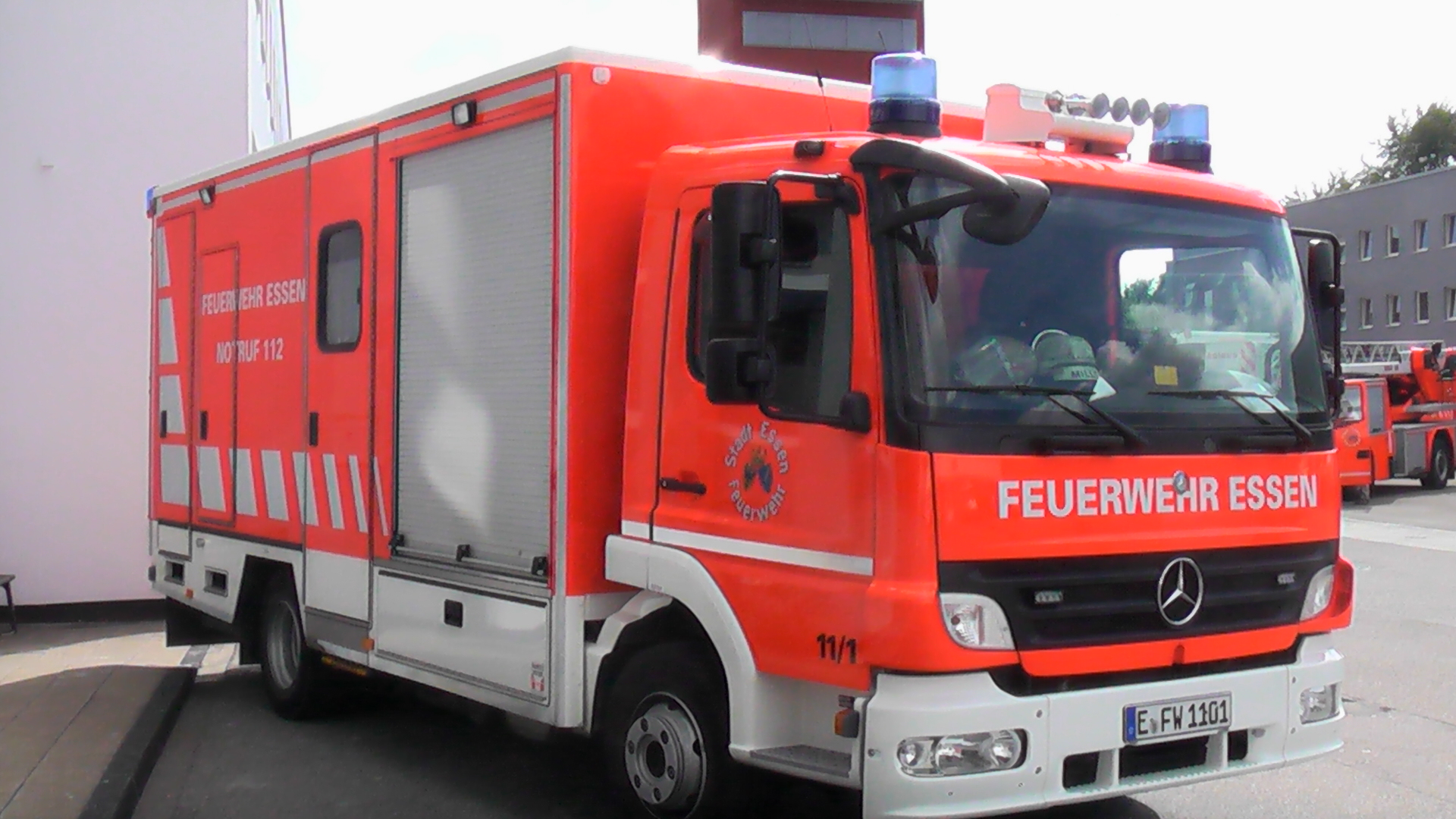 Die LRF der BF Essen (2. Generation)